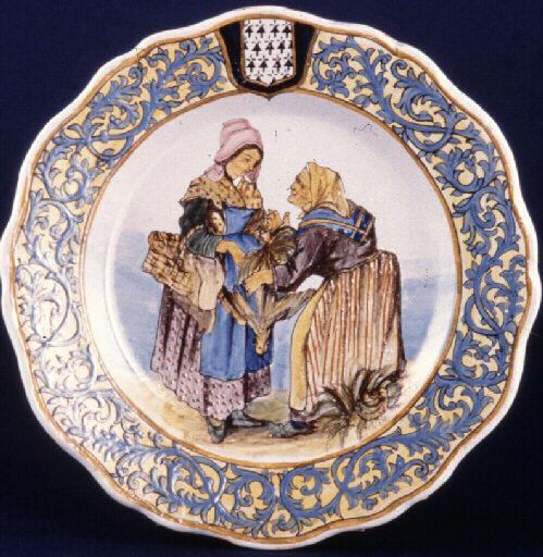 Brest : Deux femmes sur un marché à Recouvrance (faïence de Quimper, Porquier-Beau, 4e quart XIXe, Quimper, musée départemental breton)